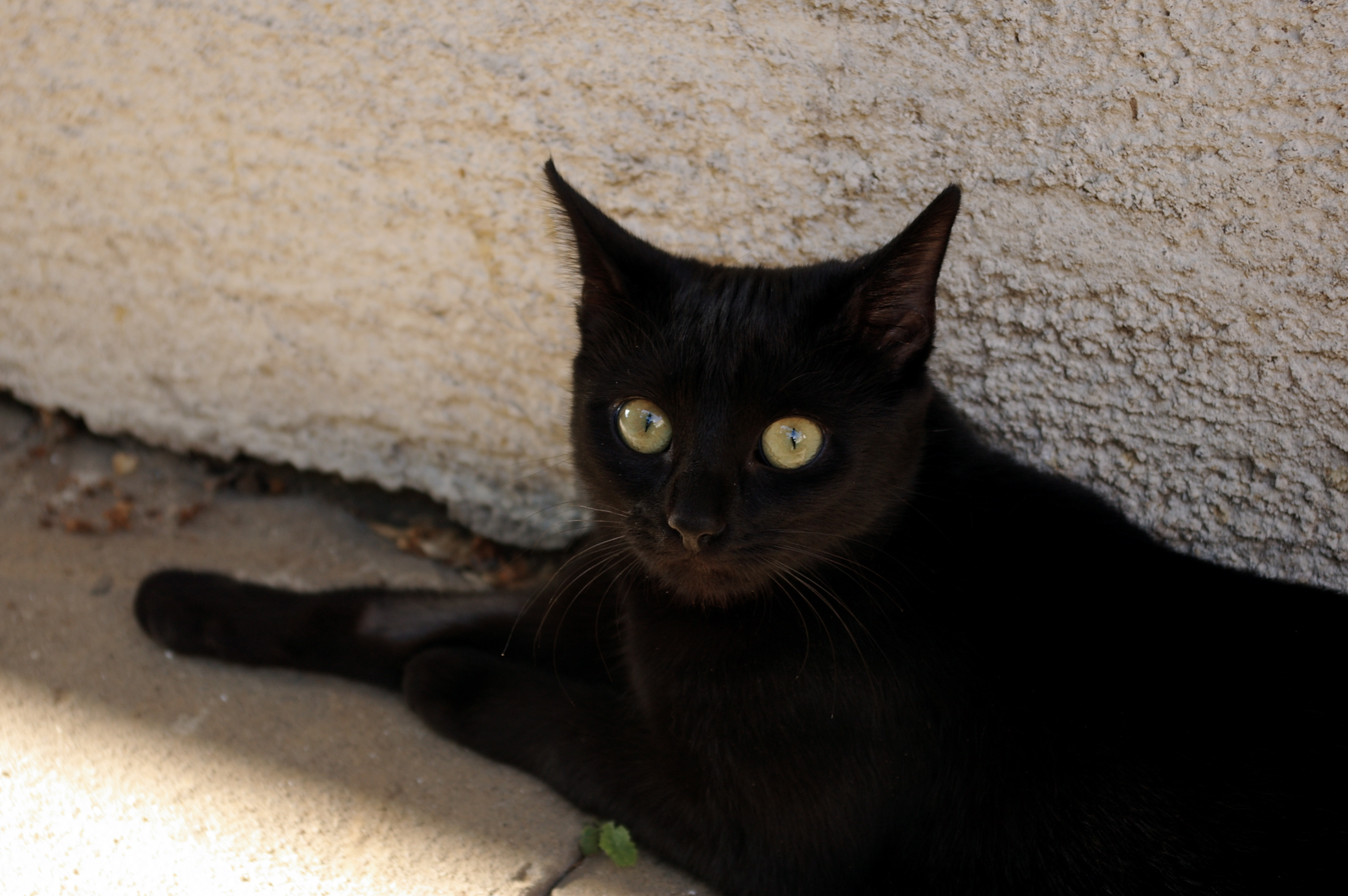 Die Katze meiner Frau